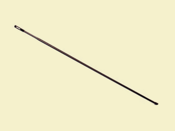 Шомпол